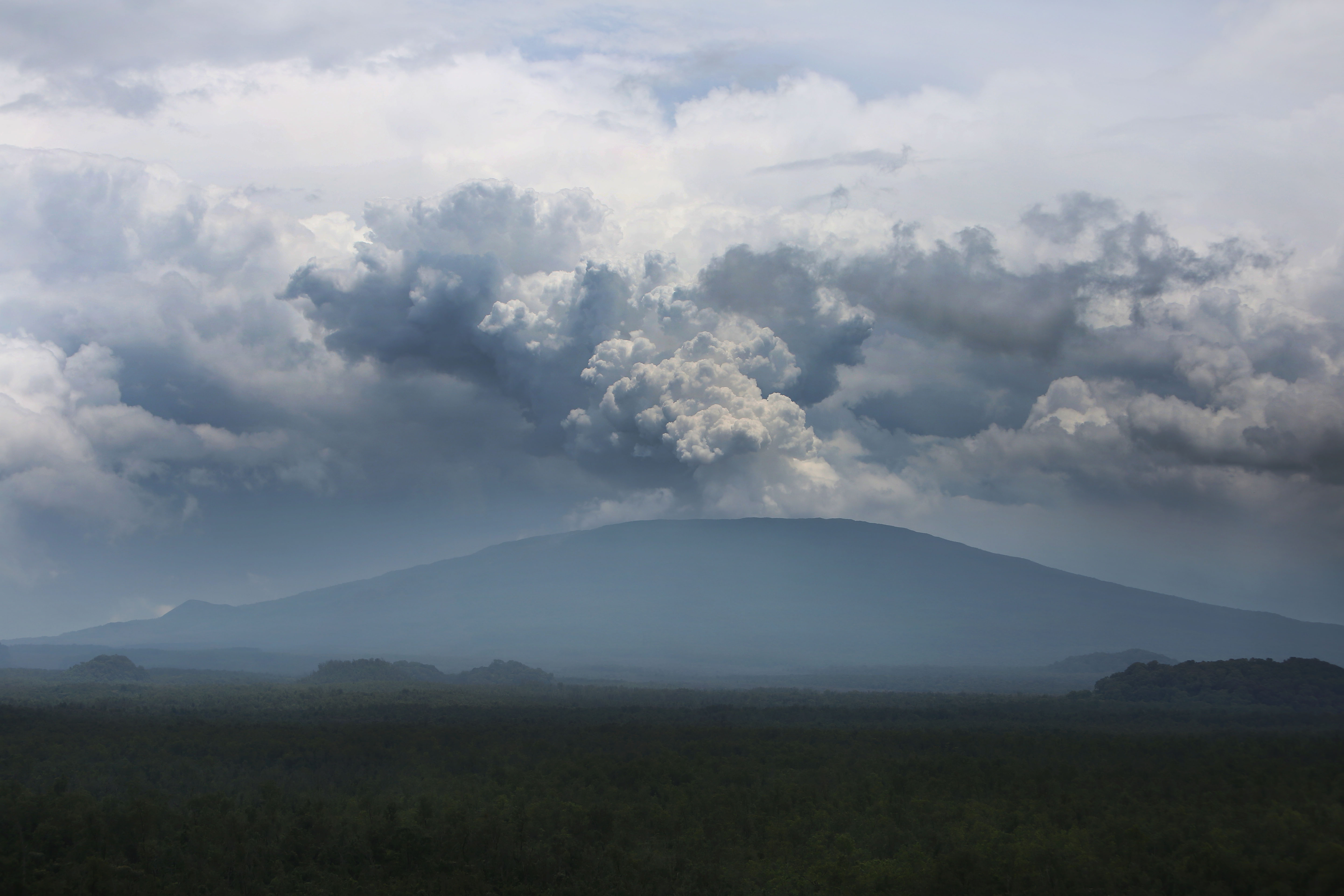 photo MONUSCO / Abel Kavanagh